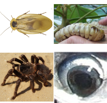 épreuve Dégustation lors Koh Lanta saison 16 épisode 8 diffusée le 21 octobre 2016 sur TF1